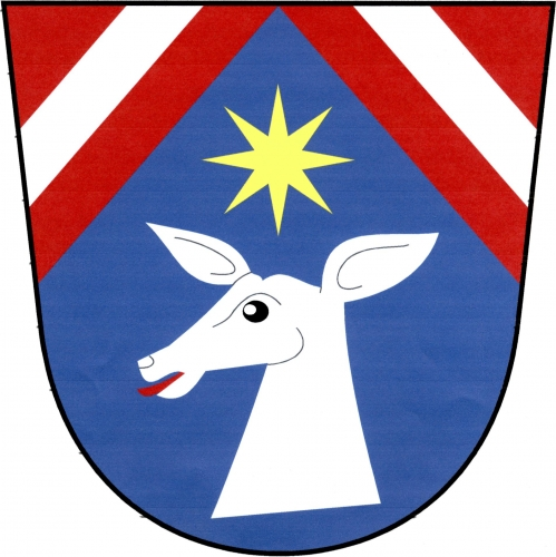 znak, Kostníky, okres Třebíč